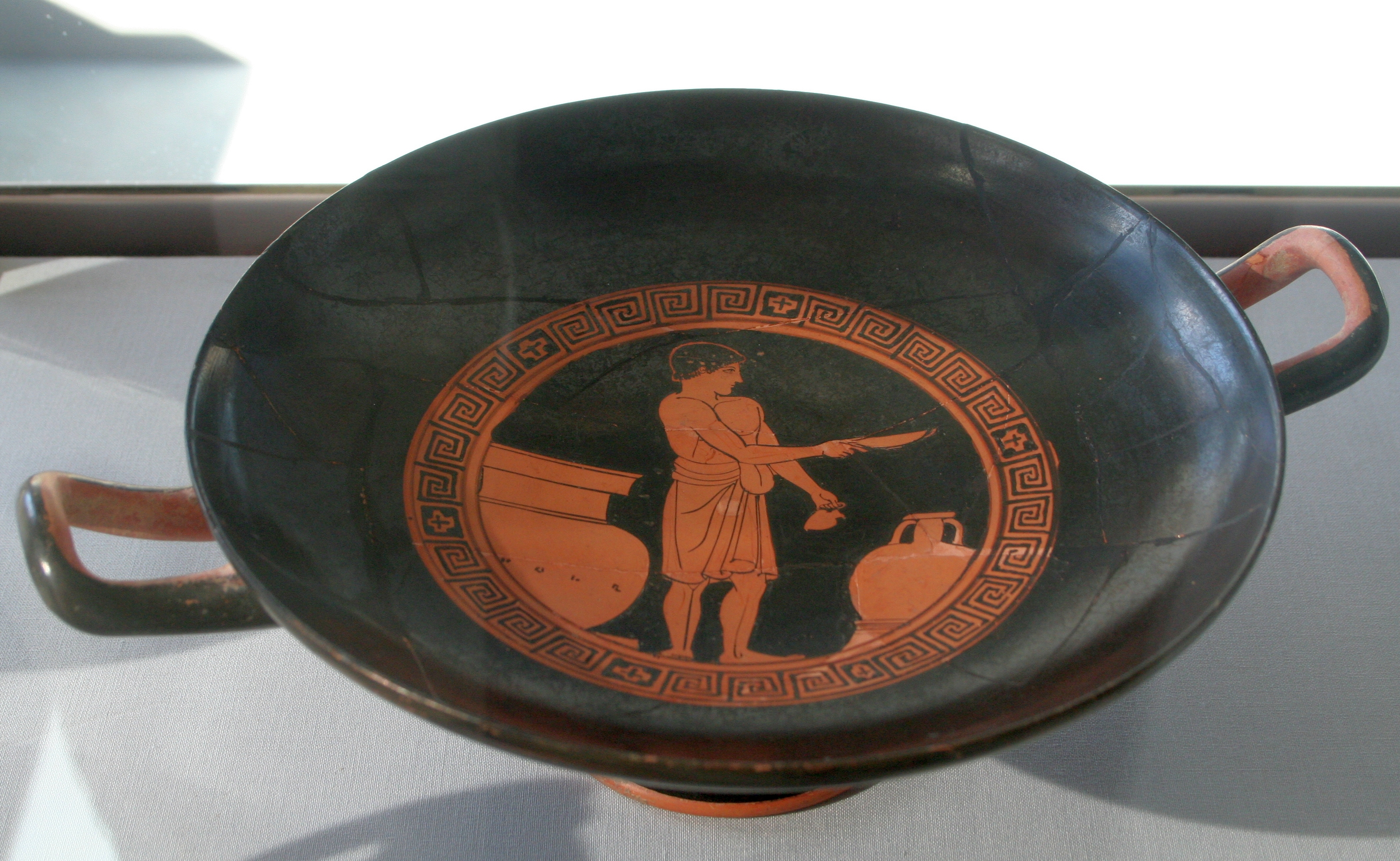 Antike attisch-griechische Kylix im rotfigurigen Stil, dem Providence-Maler zugeschrieben; Jüngling beim Mischen von Weinfür ein Symposion; um 470/60 v. Chr.; Innschriften: ΗΟ ΠΑΙΣ ΚΑΛΟΣ und ΚΑΛΕ; Antikenmuseum der Universität Heidelberg (57/8).